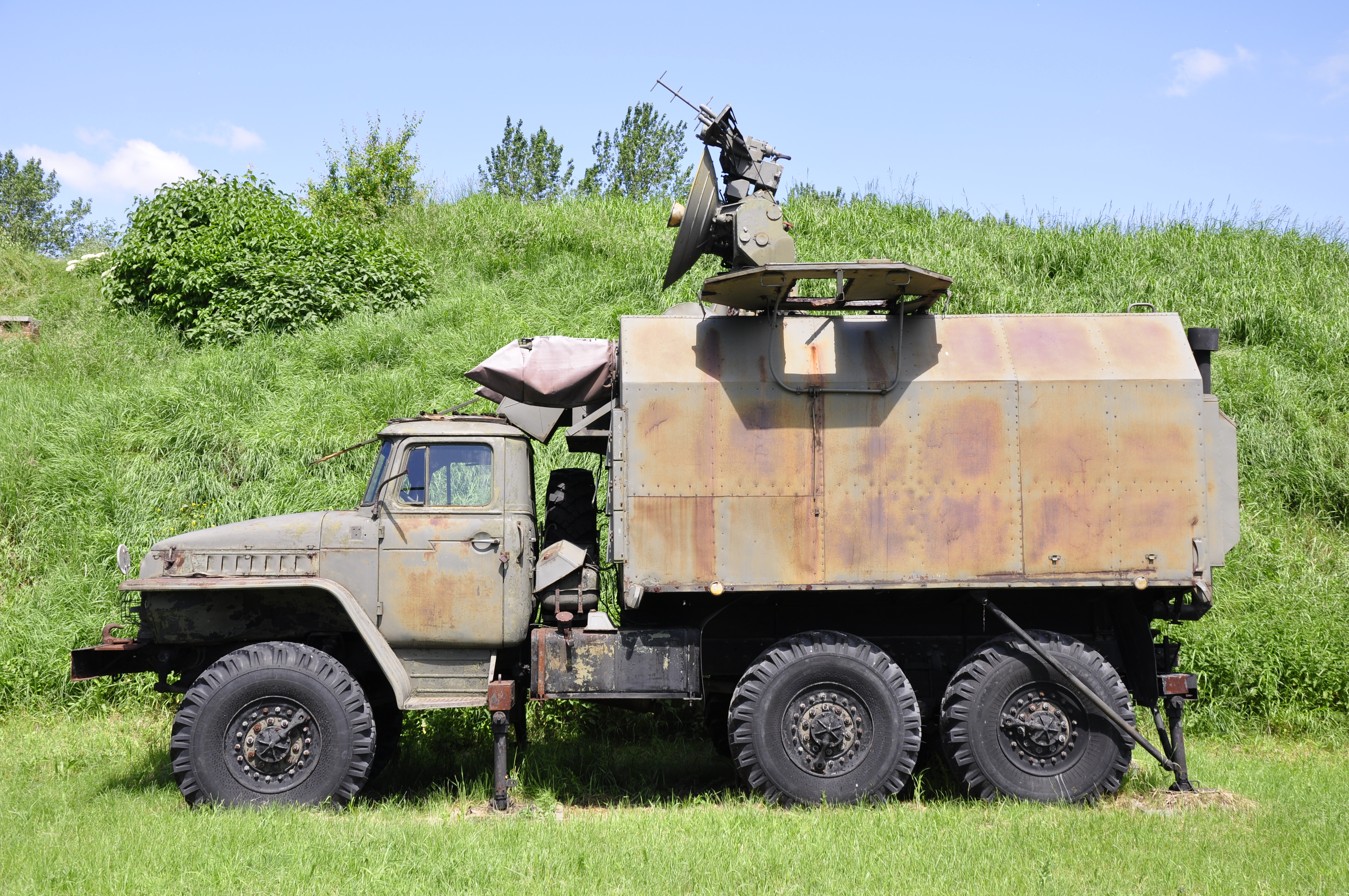 Fort IX Warschau